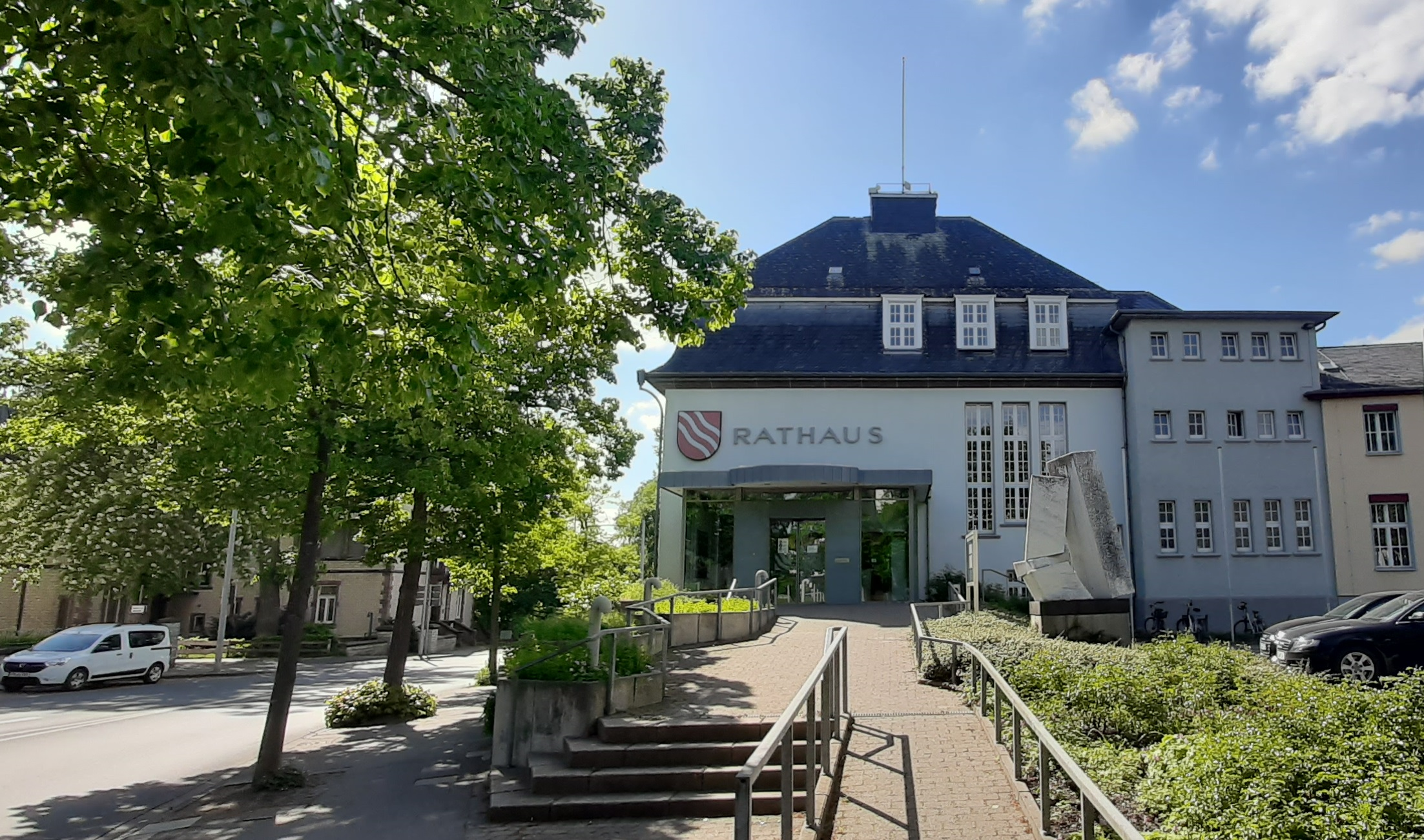 Rathaus Beckum